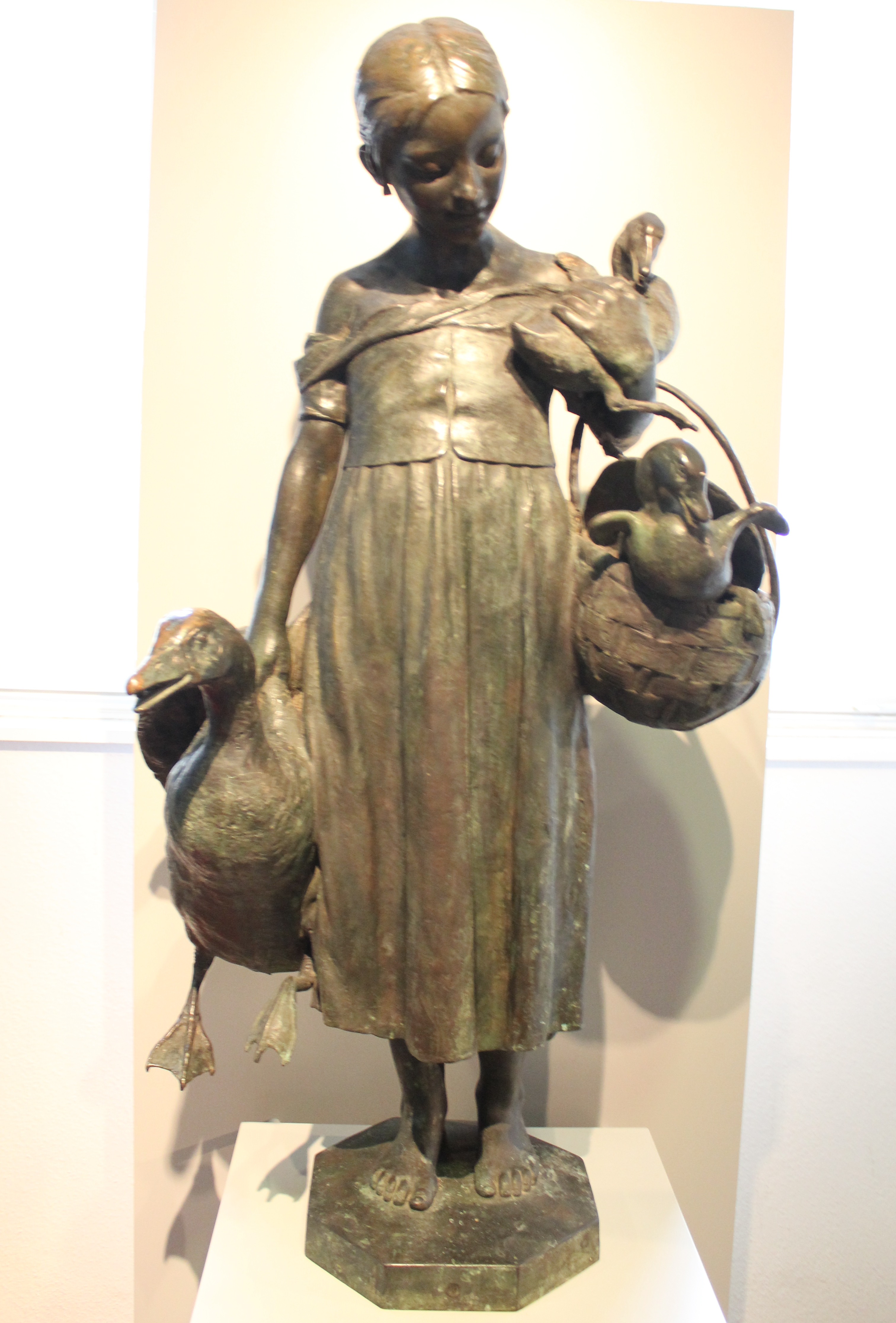 Gänseliesel (Gänsemädel) - Das Original von Paul Nisse (Bronze, 1901) im Städtischen Museum der Stadt Göttingen